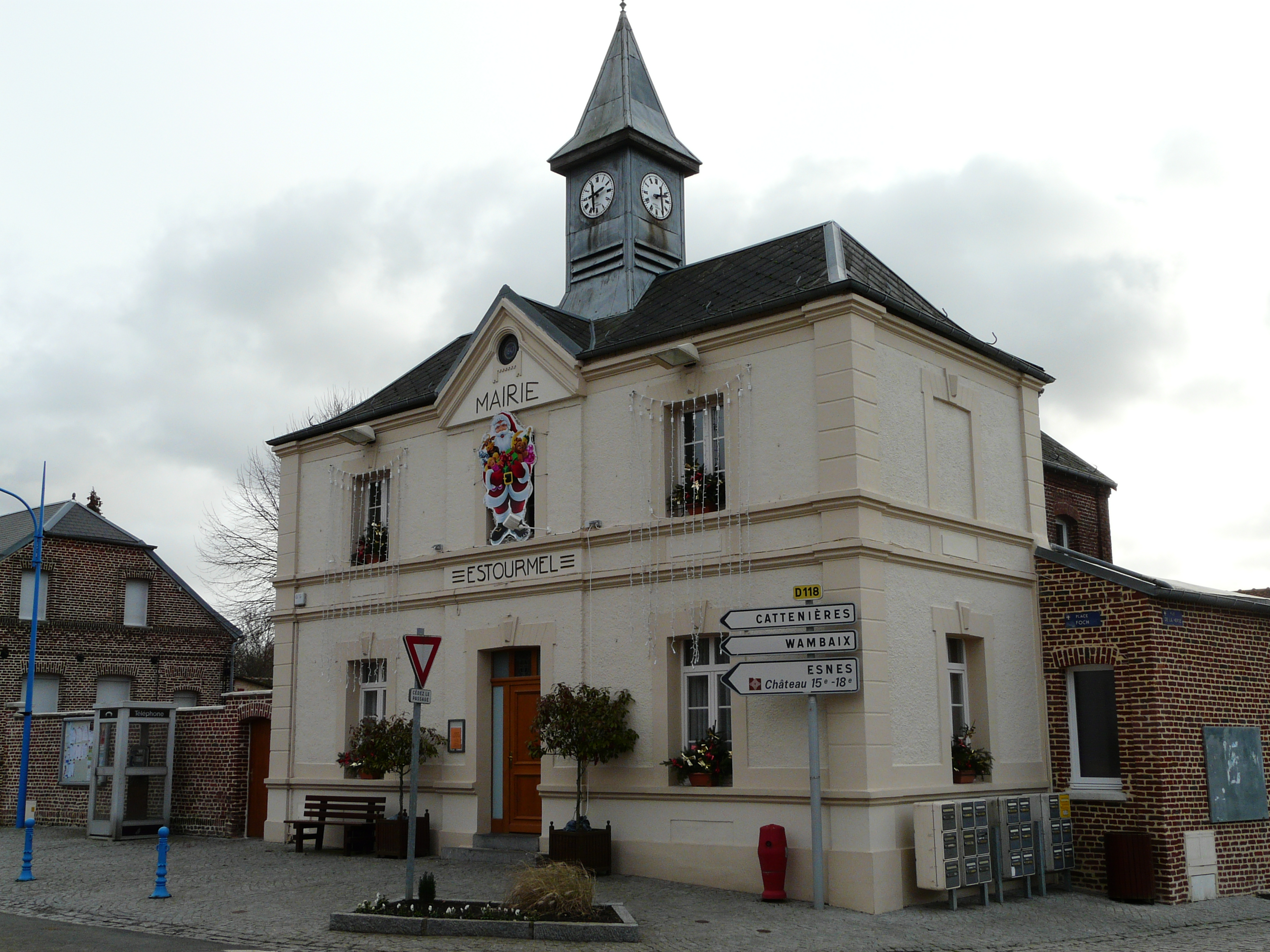 Mairie d' Estourmel (Nord)